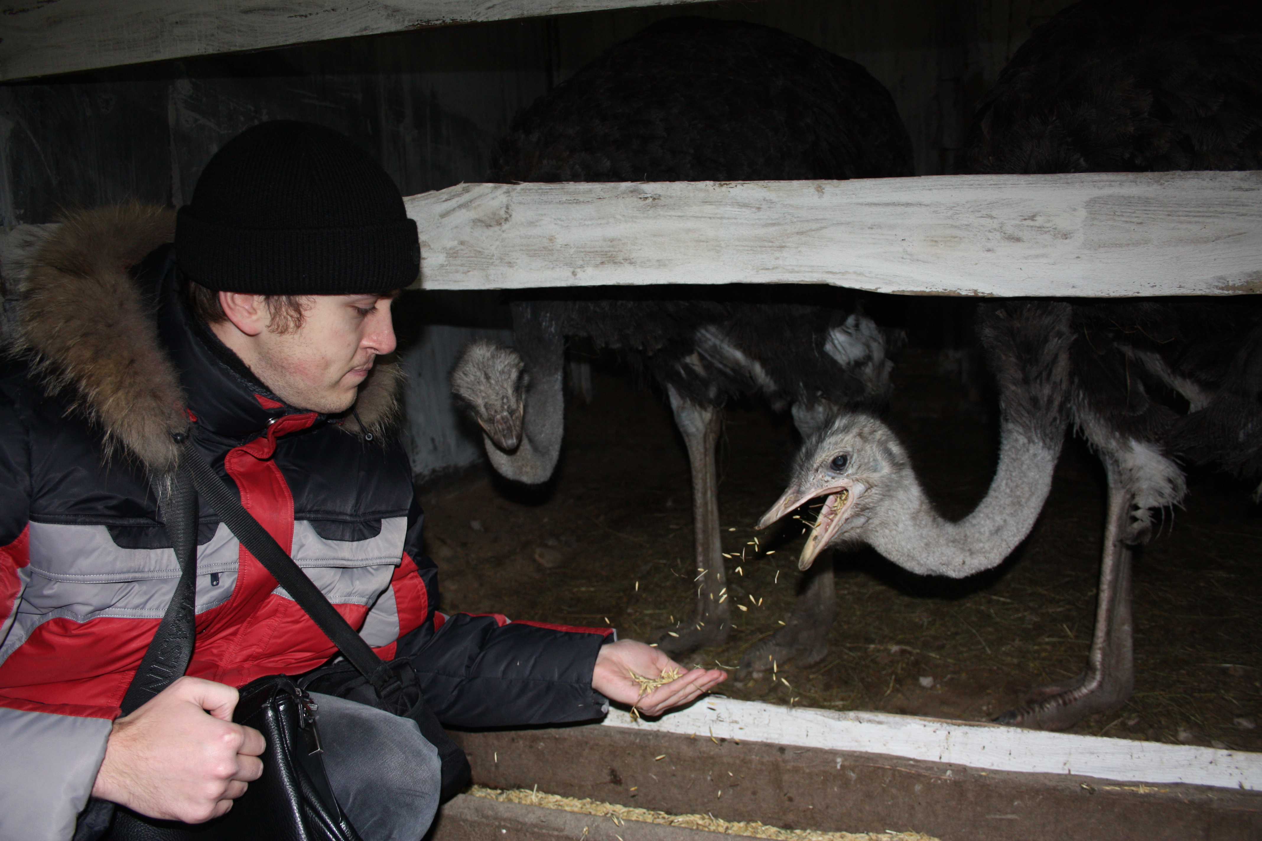 Кормление страуса овсом